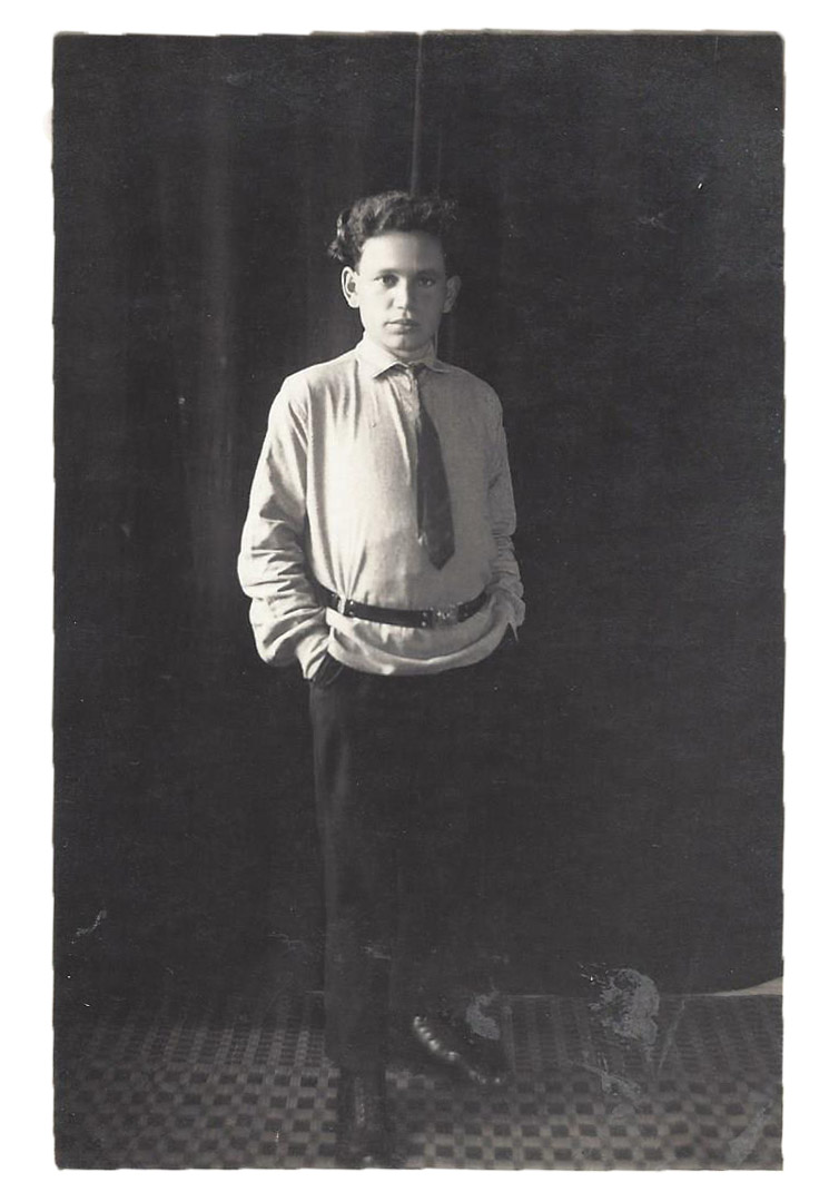 משה צחר בצעירותו